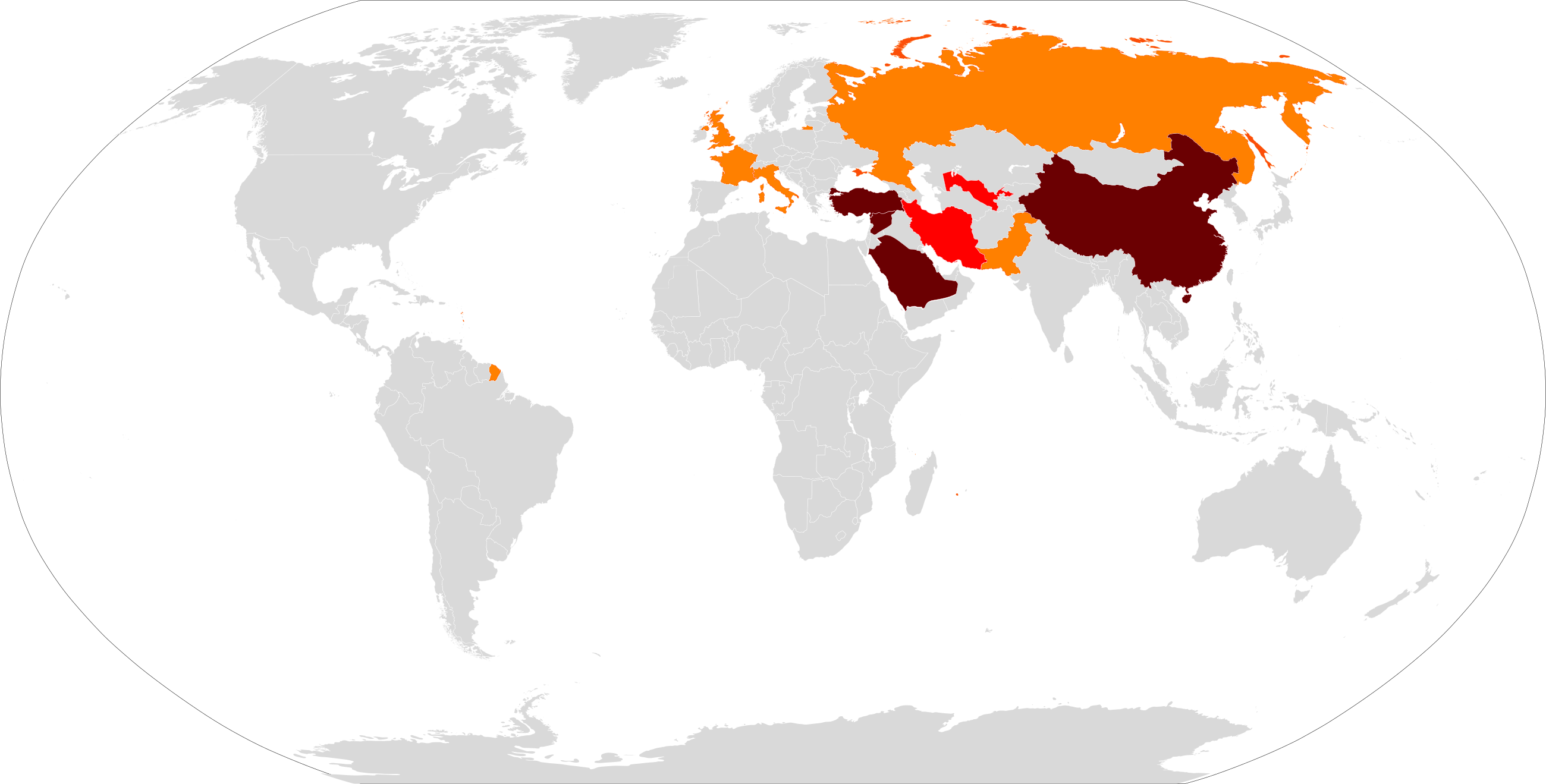 The map shows countries in which Wikipedia is blocked by the government: Some Wikipedia information came into clash with the government Some languages or articles are blocked Wikipedia is fully blocked No known restrictions